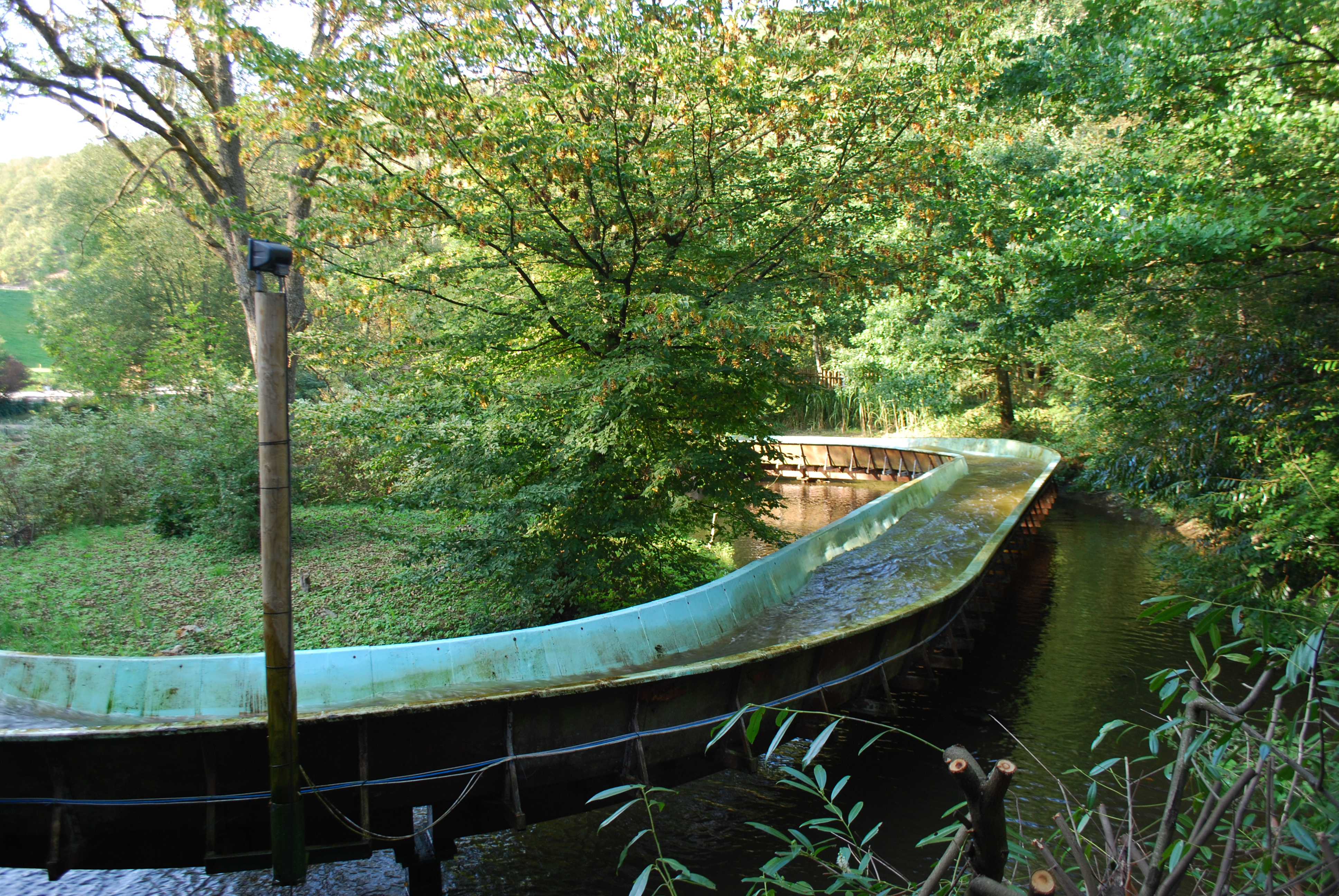 Vue de l'attraction "Splash" à Plopsa Coo.